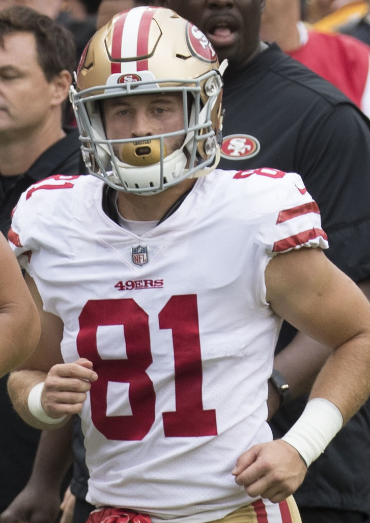 49ers at Redskins 10/15/17